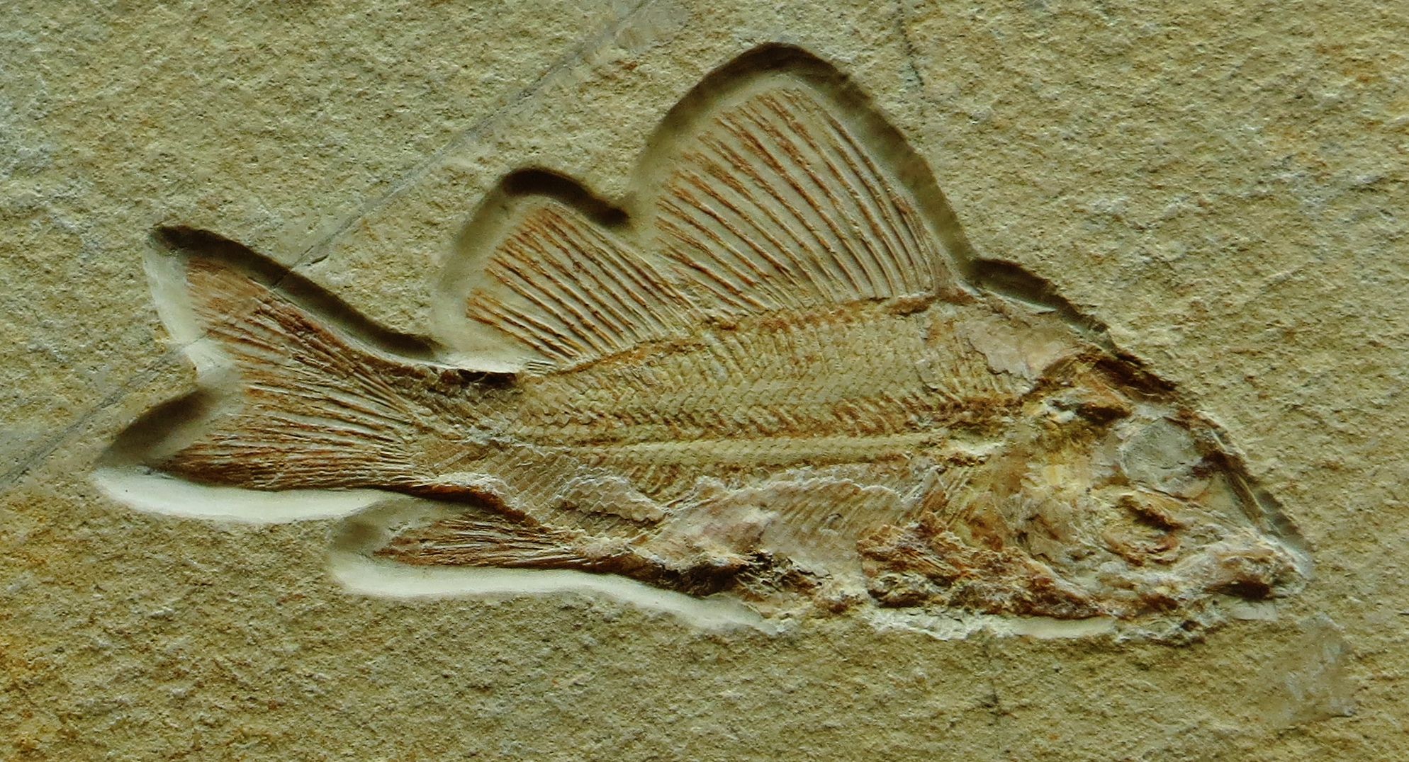 Took the picture at Museum Berger, Eichstaett